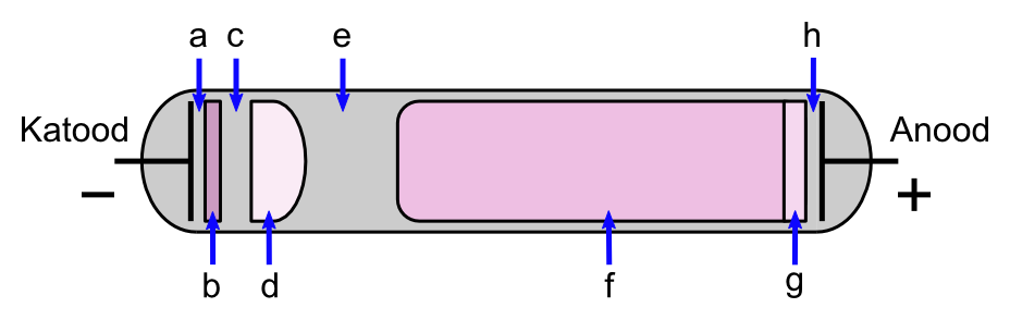 Huumlahenduse piirkondade jaotus valguse intensiivsuse järgi